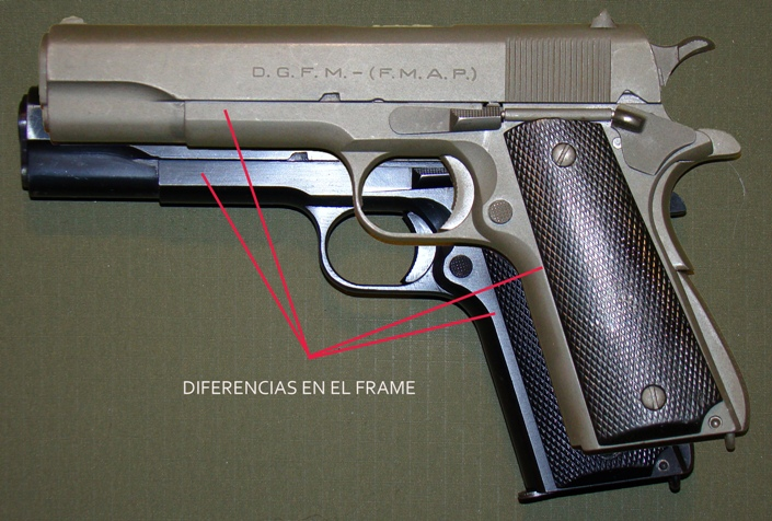 Comparacion de los dos tipos de frame en las pistolas sistema colt